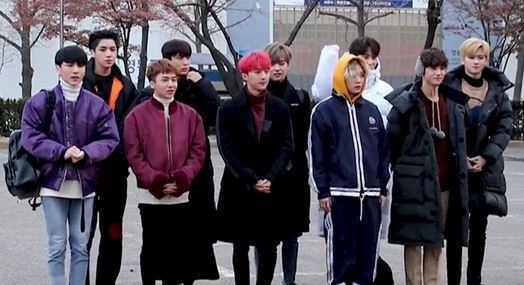 171208 펜타곤(PENTAGON) 뮤직뱅크 리허설 출근길 풍경 입니다. 카드(KARD), 빅톤(VICTON), 구구단, 블라블라(Blah Blah), 사무엘, 이하린, 펜타곤(PENTAGON), 유설, BLK, 더로즈, 아이시어, 이선정밴드, 닉앤쌔미, 레드벨벳(RedVelvet), 몬스타엑스(MONSTA X), 소울라티도, 장문복x성현우, 현아, 세븐틴 (Seventeen), 더보이즈가 참여했습니다.